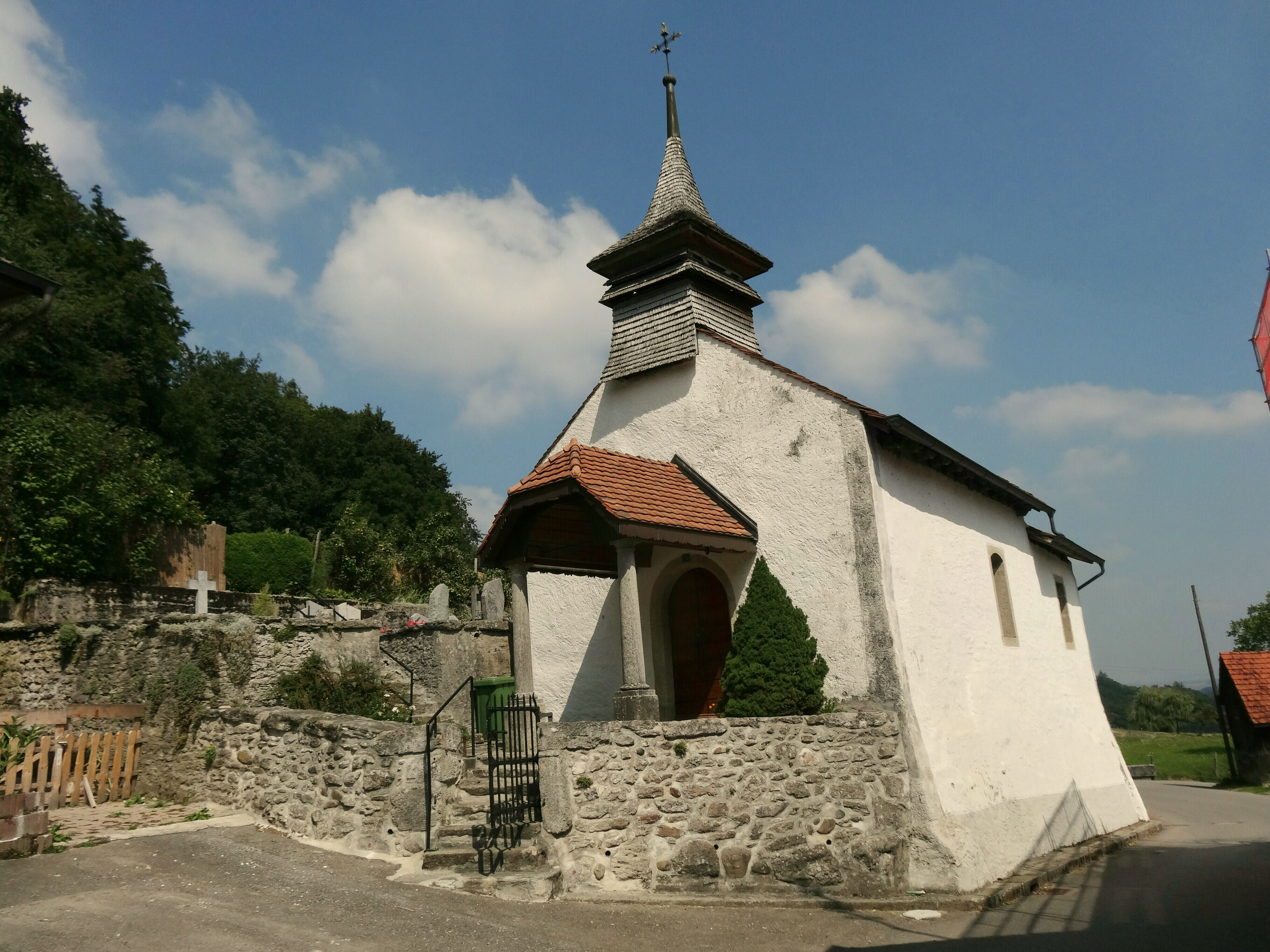 La chapelle de Franex. Franex fait partie de la commune de Murist au canton de Fribourg (Suisse).